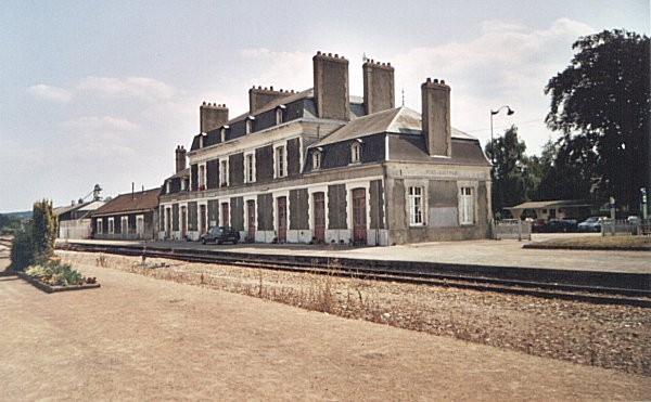 Pont-Audemer Station, Pont-Audemer.